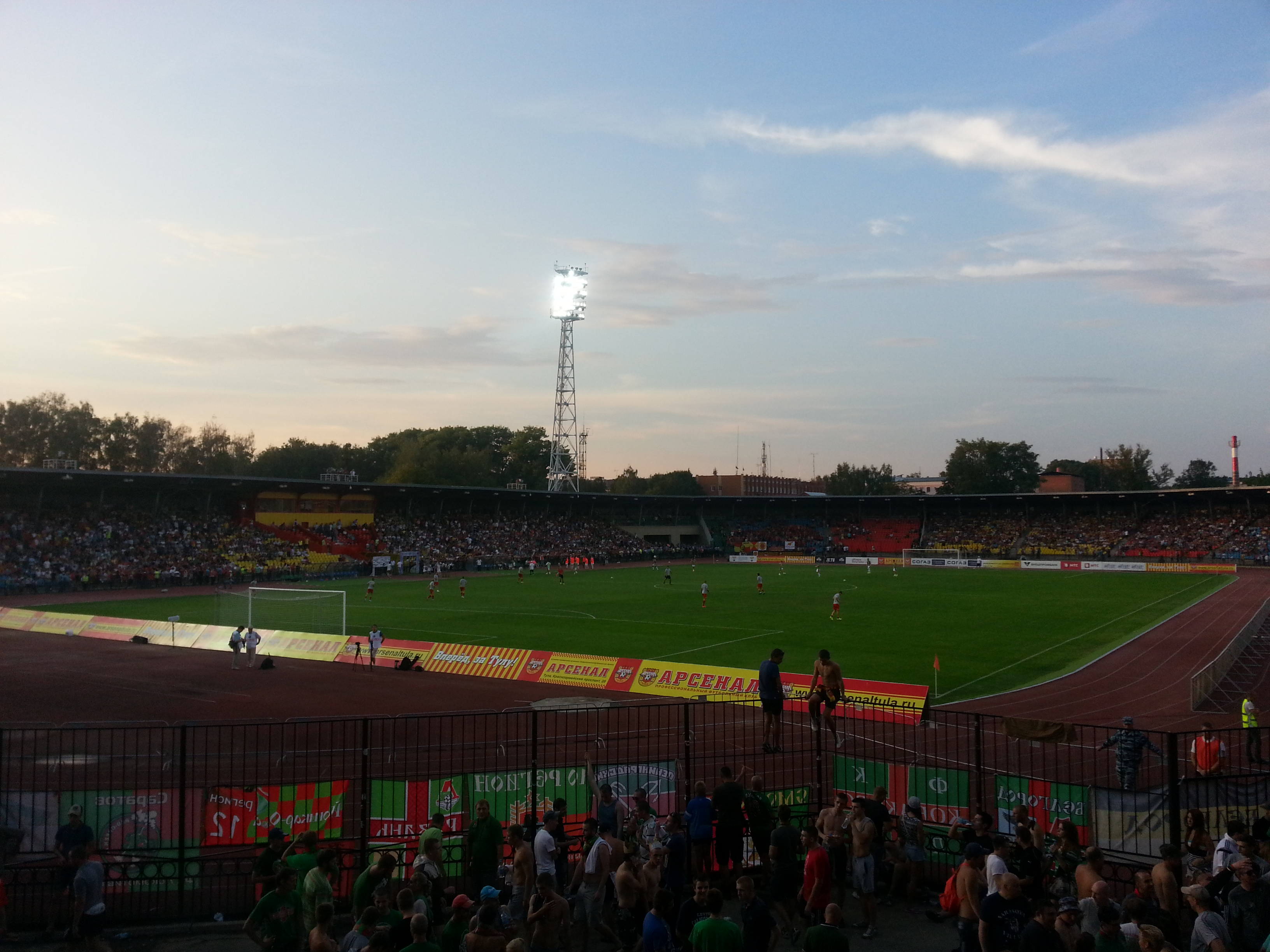 Центральный стадион "Арсенал" в Туле